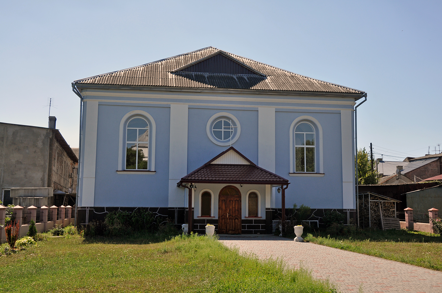 Синагога (мур.), Буськ, вул. Буського братства, 3